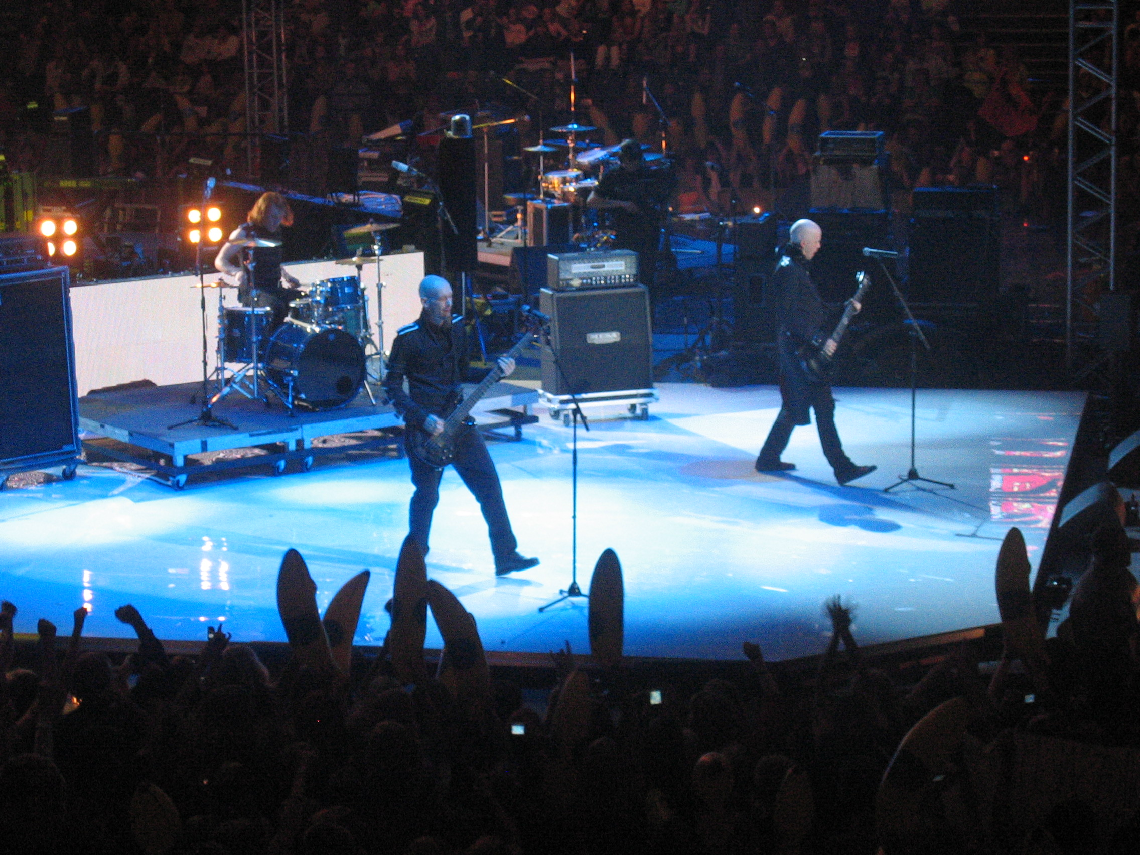 Apulanta in Hartwall Arena 12.9.07